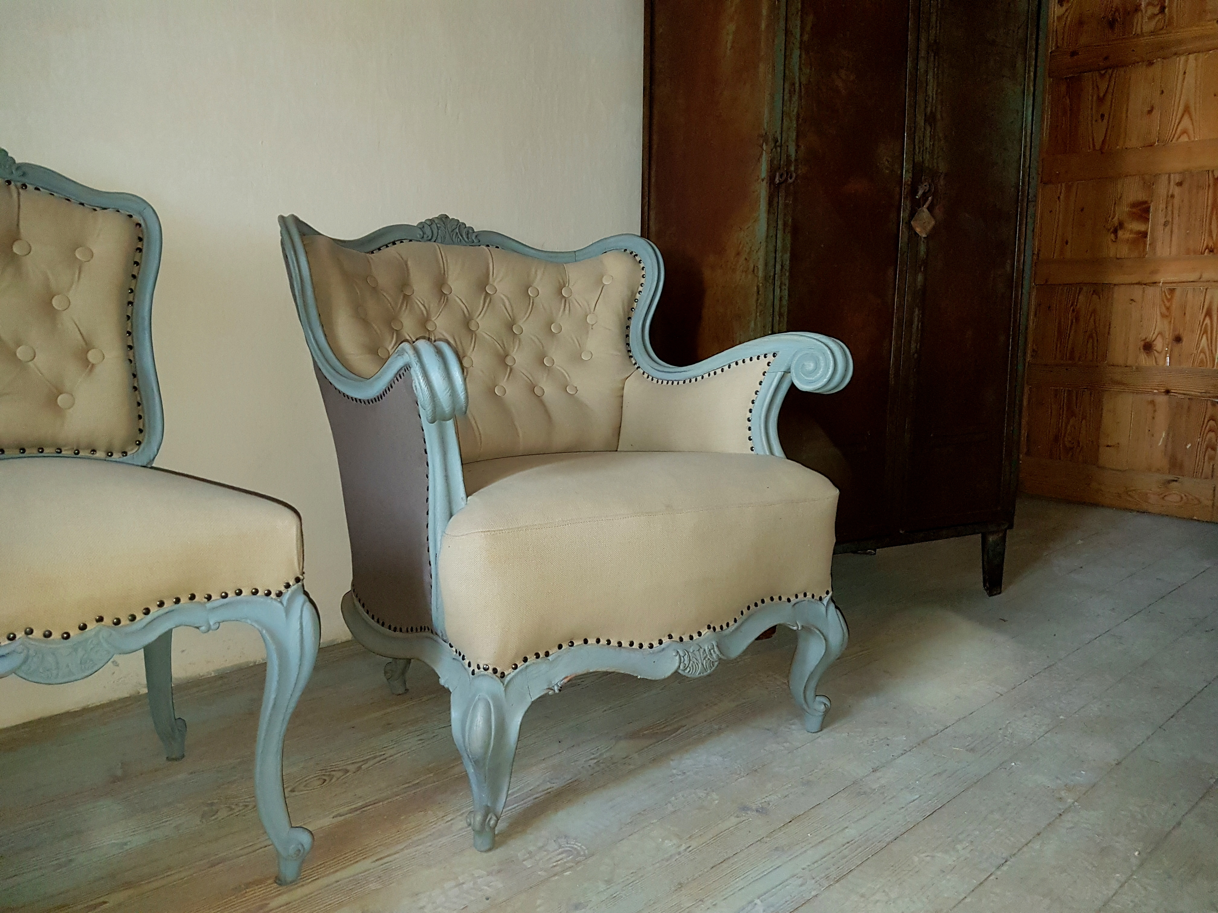 vintage fotel, felújított neobarokk fotel